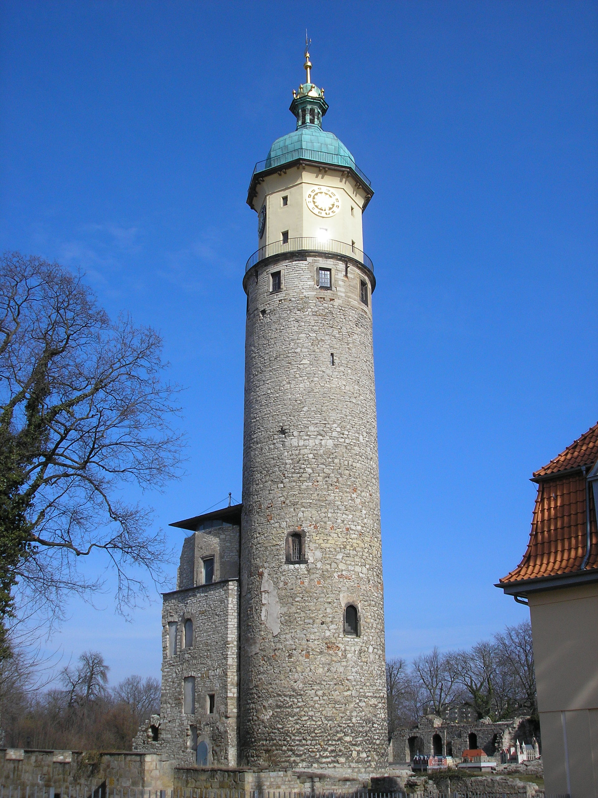 Der Neideckturm in Arnstadt (Thüringen).